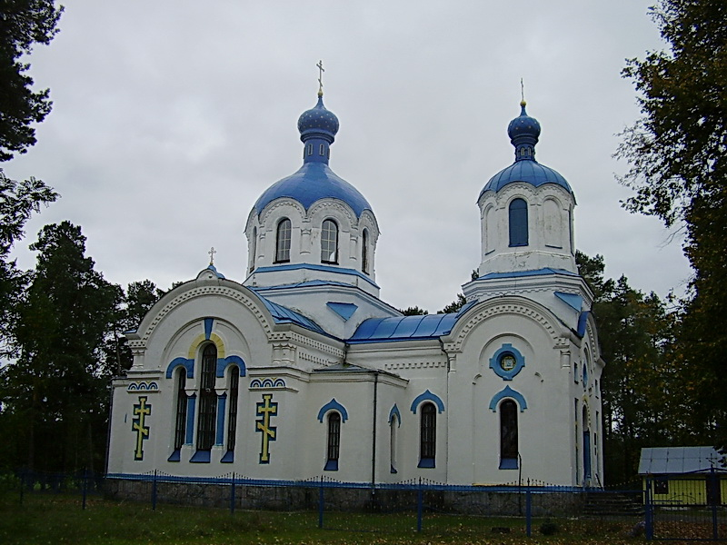 Чыжэўшчына. Царква